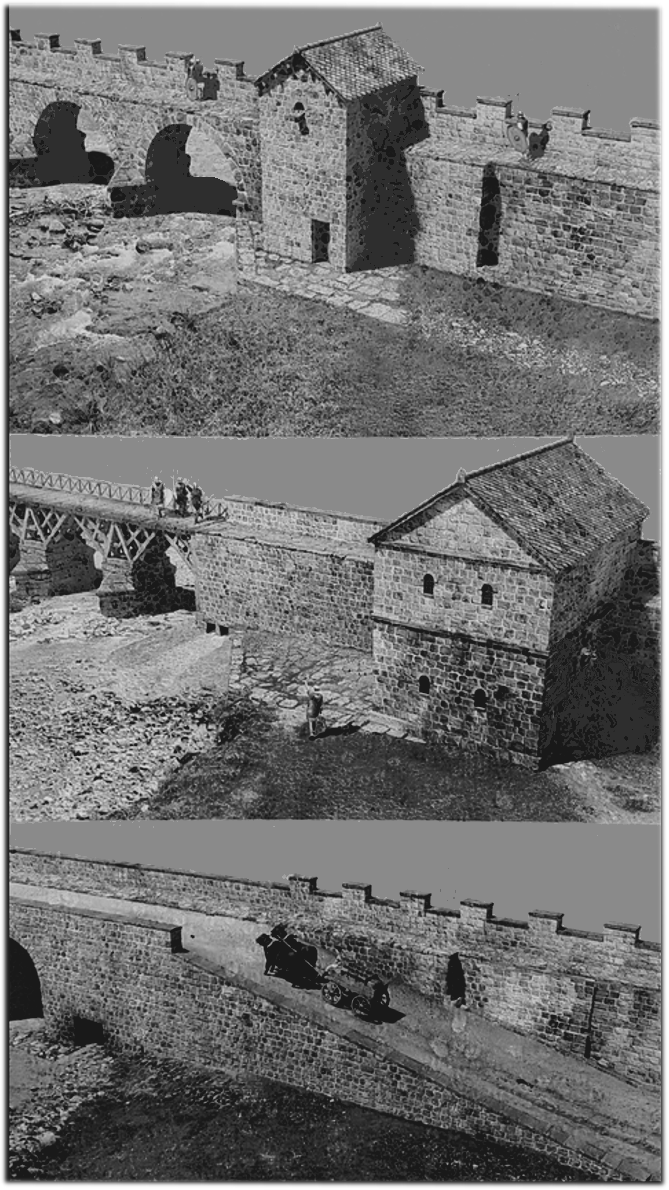 Rekonstruktionsversuch der Bauphasen der Wallbrücke bei Willowford (Hadrianswall), GB.